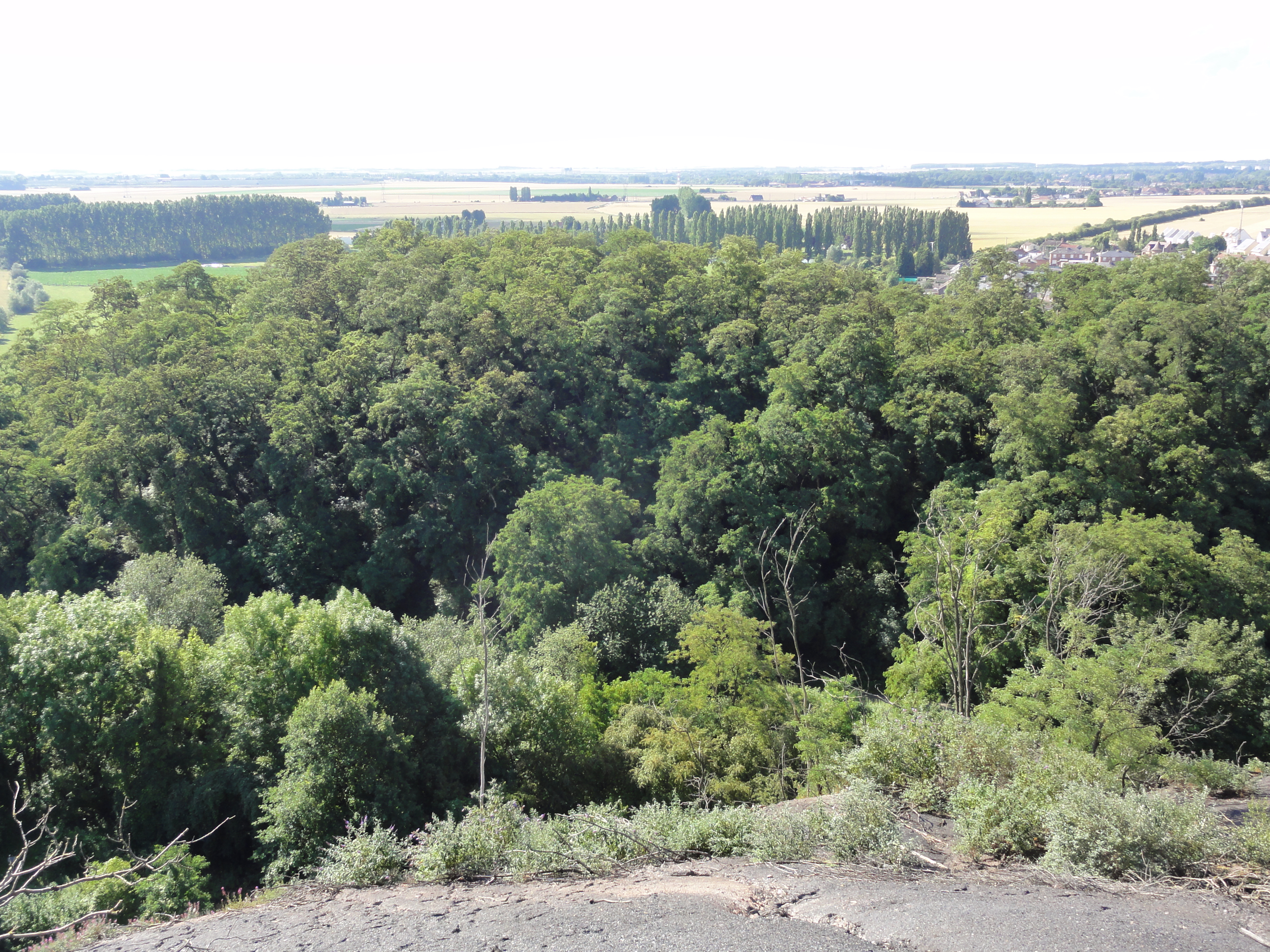 Terril n° 158 dit Haveluy Sud, fosse d'Haveluy de la Compagnie des mines d'Anzin dans le bassin minier du Nord-Pas-de-Calais, Haveluy, Nord, Nord-Pas-de-Calais, France. Le terril no 158 est inscrit sur la liste du patrimoine mondial de l'Unesco le 30 juin 2012 et y constitue en partie le site no 15.